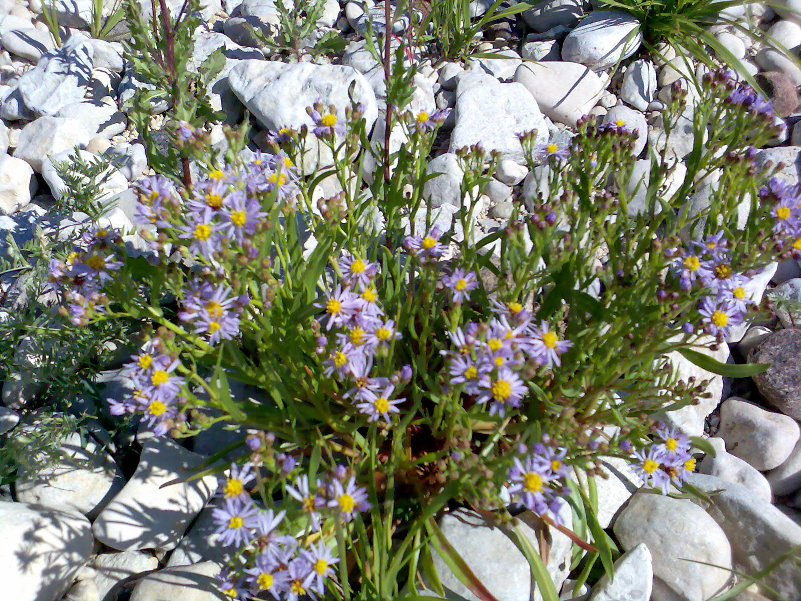 Aster tripolium, Meriasteri. Kuvattu Hiidenmaalla 7/2007. Photo taken at Hiiumaa, Estonia